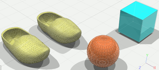 3D demonstratie van enkele voorwerpen. De bol en het vierkant zijn wiskundige definities. De vorm van de klompen is vastgelegd door een groot aantal punten (ruim 2000 per klomp). Eigen ontwerp, gemaakt met programma Strata 3D 3.0.2 (gratis versie die ook gebruikt mag worden, geen demo-versie). Nabewerkt in De Gimp (open source).